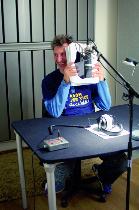 Rufus Beck bei den „Harry Potter“-Aufnahmen im Tonstudio, fotografiert von Peter von Felbert